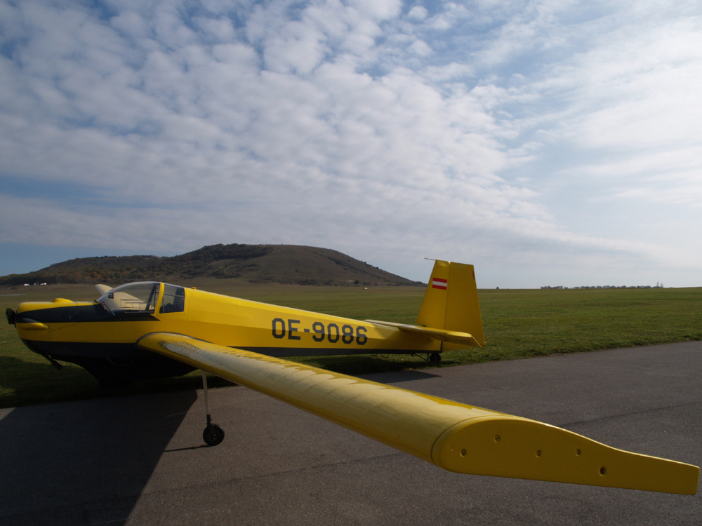 SF25c am Flugsportzentrum Spitzerberg (Österreich)